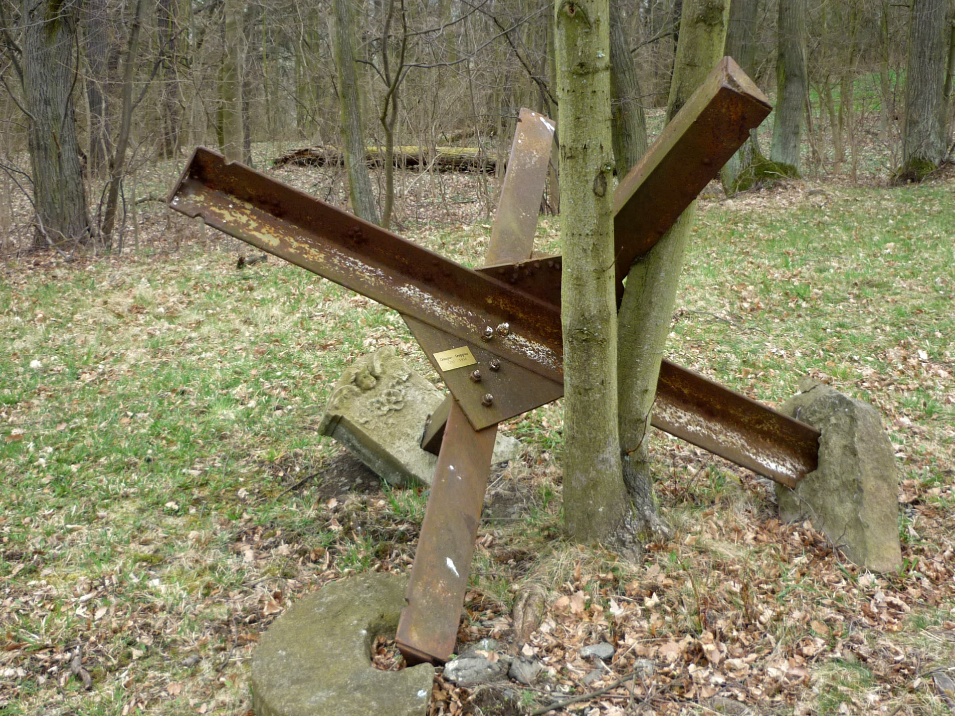 Lapidarium der zerstörten Orte im Duppauer Gebirge auf dem Winteritzer Kapellenberg: Stahlkonstruktion aus Doupov – Duppau (1281-1954)